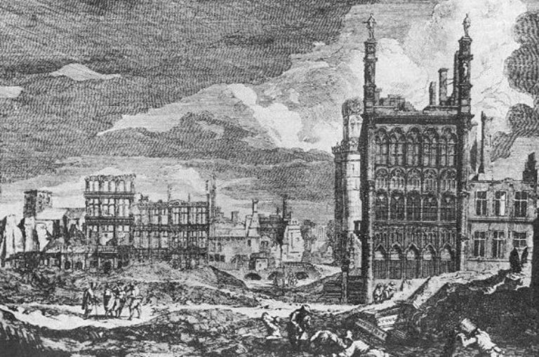 Gravure d'après un dessin de Augustin Coppens représentant la Grand-Place de Bruxelles après le Bombardement de 1695 par les troupes françaises de Louis XIV, détail, de Vue des ruines de la Grand-Place depuis la rue de la Colline, maisons entre la rue de la Tête d'Or et la rue au Beurre, à droite beffroi de Saint-Nicolas et Maison du Roi